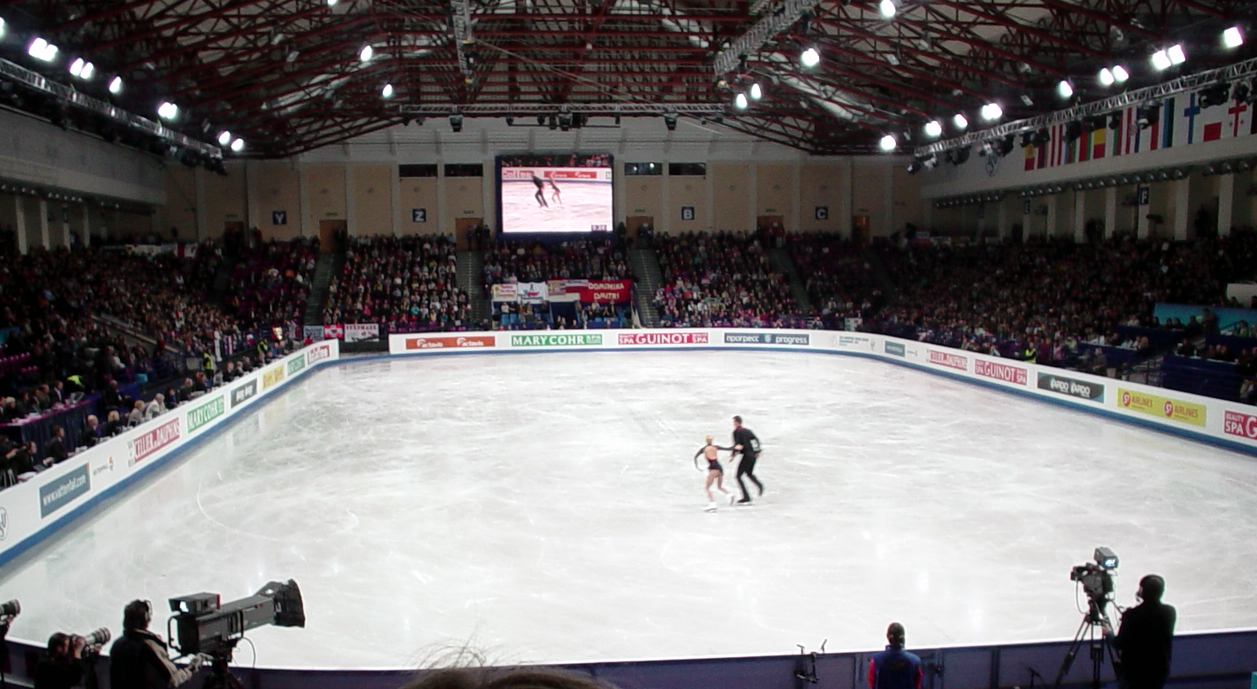 Hala sportowa Torwar w Warszawie w czasie występu Doroty i Mariusza Siudków na ME w łyżwiarstwie figurowym 2007 (program dowolny).